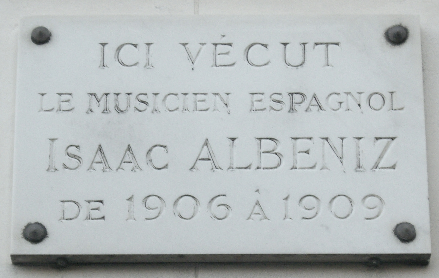 Plaque commémorative, 55 rue de Boulainvilliers, Paris 16e. « Ici vécut le musicien espagnol Isaac Albéniz de 1906 à 1909. »